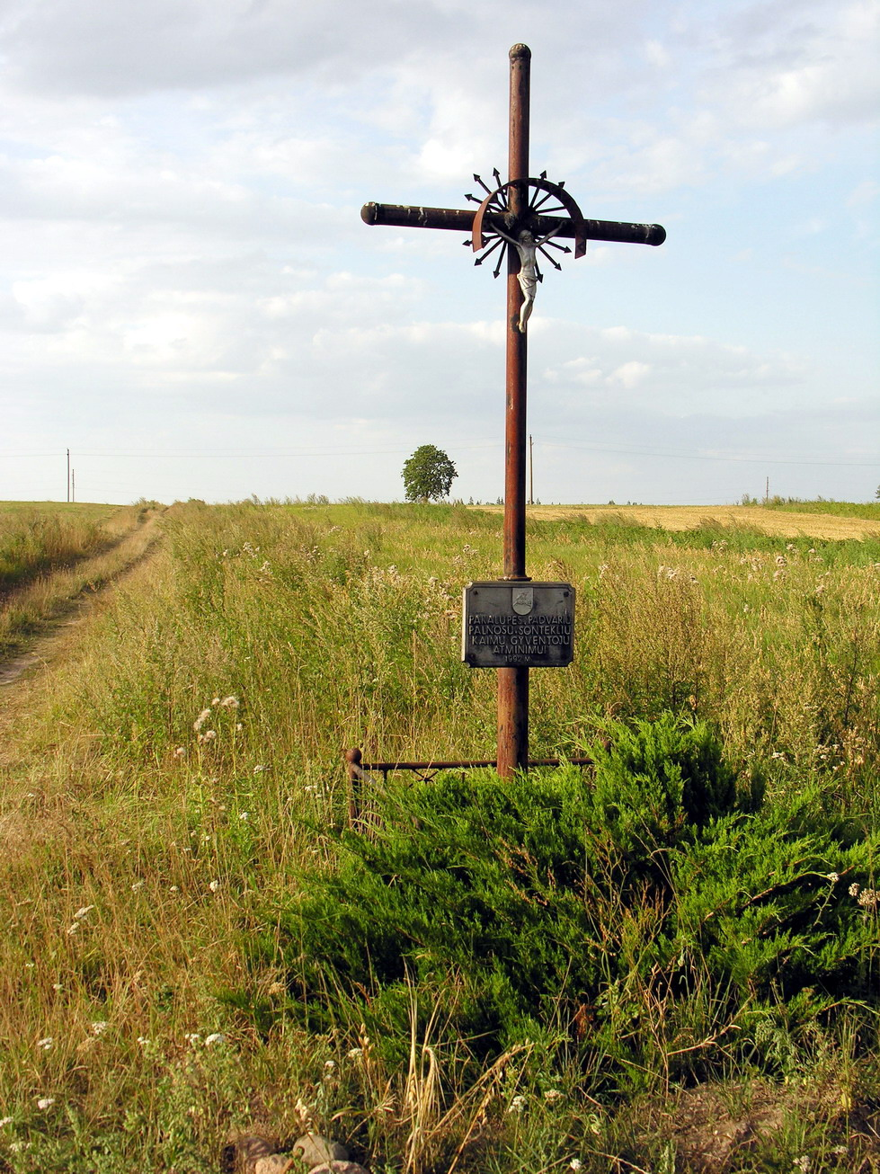 Padvariai, Mažeikių raj., Viekšnių sen. Kryžius Padvarių kaimo laukuose to kaimo ir aplinkinių kaimų gyventojų atminimui Foto: Algirdas, 2006 m. rugpjūčio 11 d., Lietruva